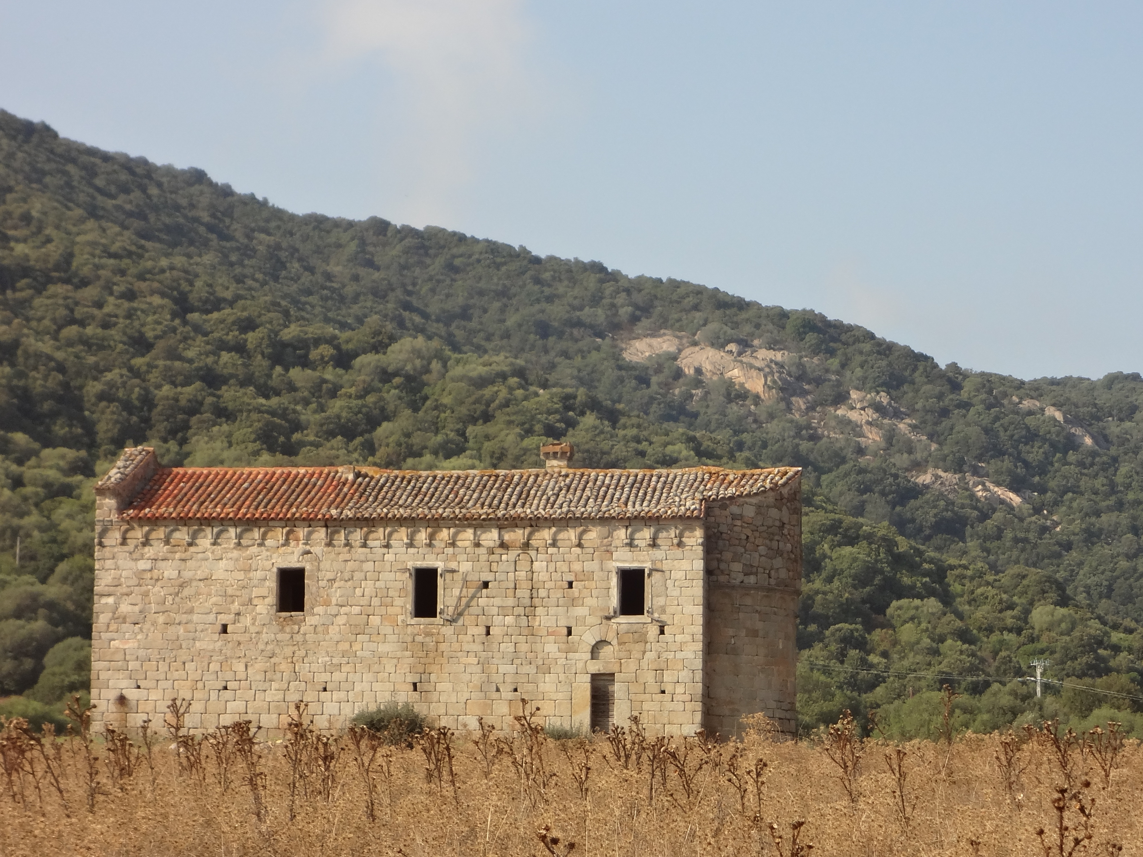 Église San Giovanni de Grossa, Corse (Classé, 1977)